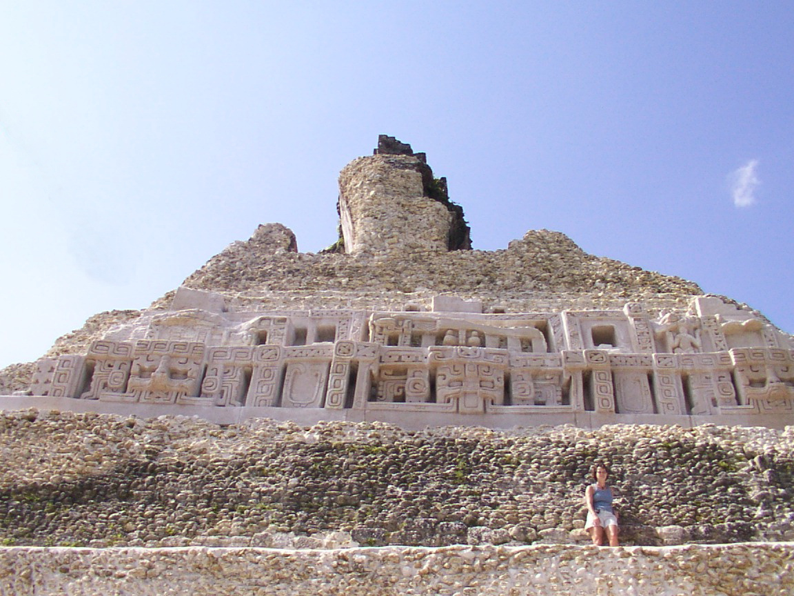 Xunantunich, Maya Temple, BelizeEl Castillo East Frieze